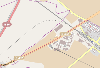 Carte de Verneuil.